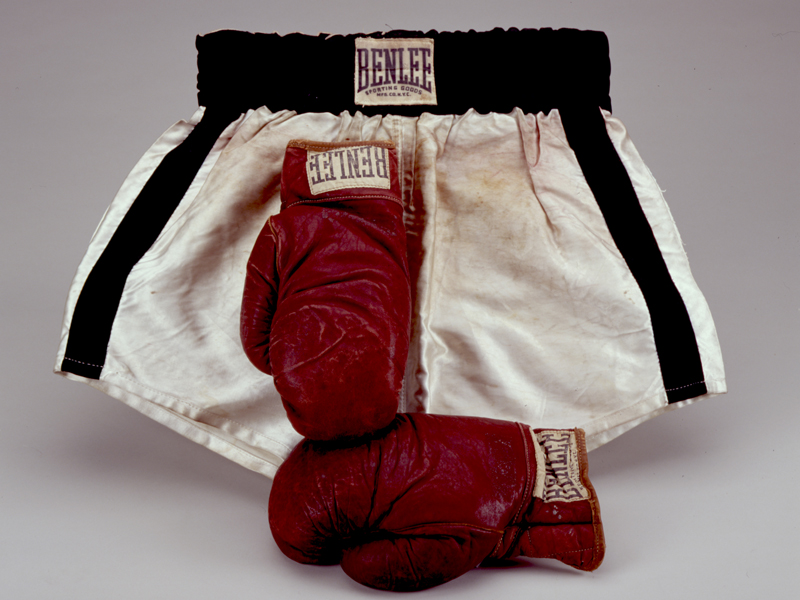 Gants de Marcel Cerdan vers 1940